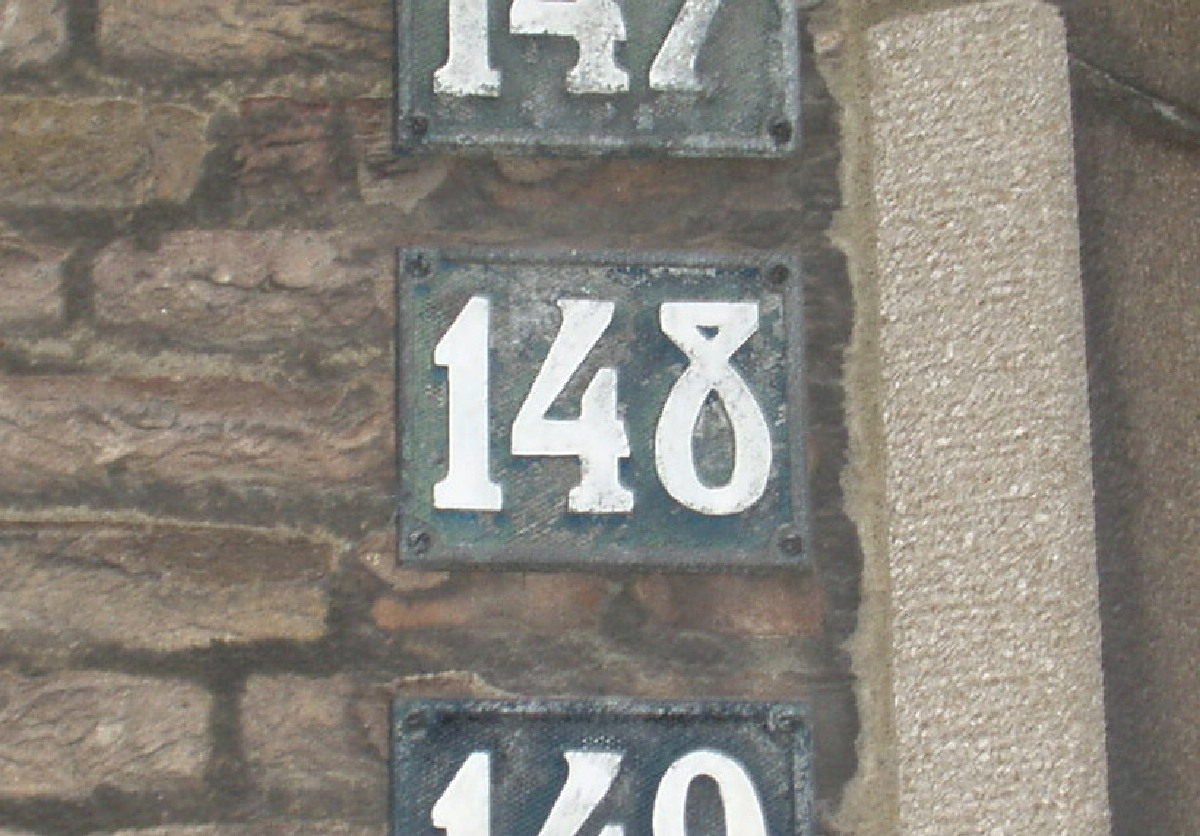 Huisnummers